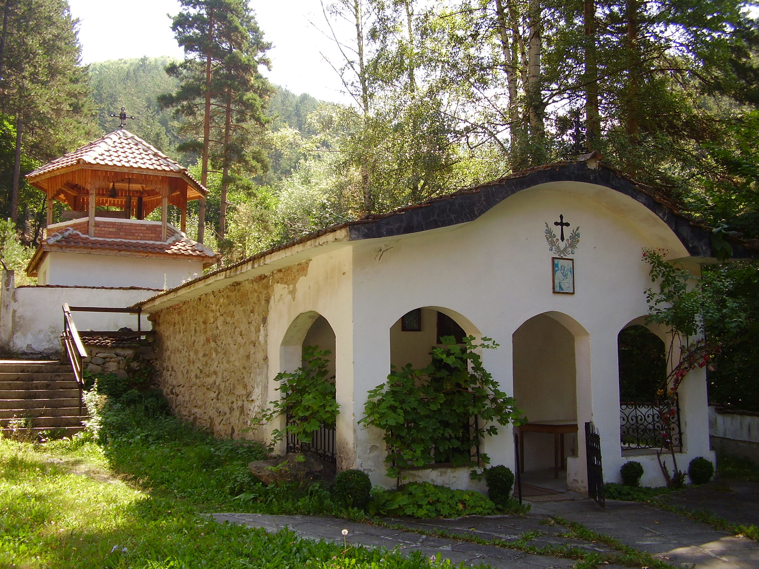 Средновековна църква "Свети Архангел Михаил" - с.Сапарево, общ.Сапарева баня